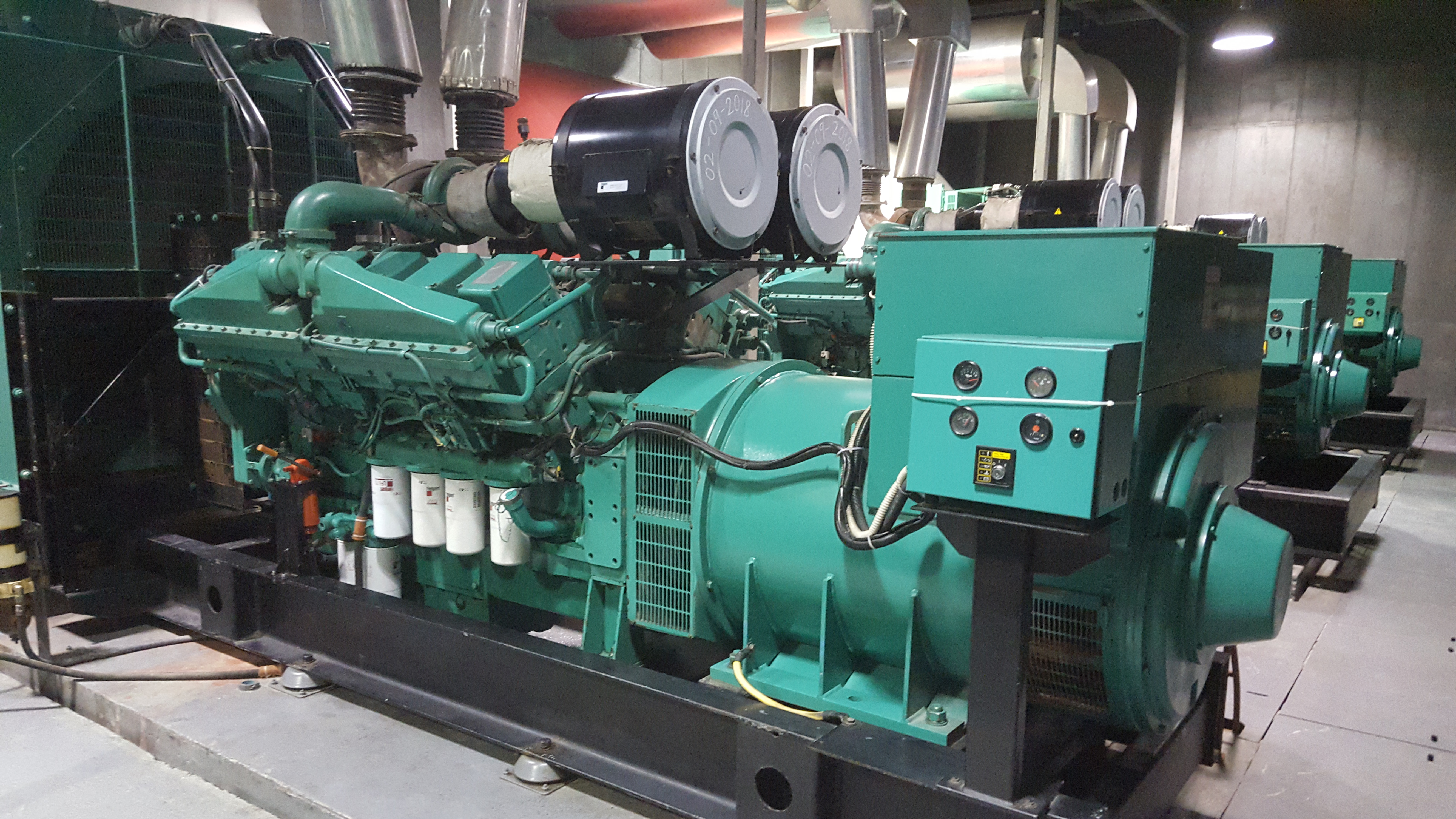 Zwei von vier Stamford Generatoren decken den notwendigen Strombedarf der Insel Vilamendhoo